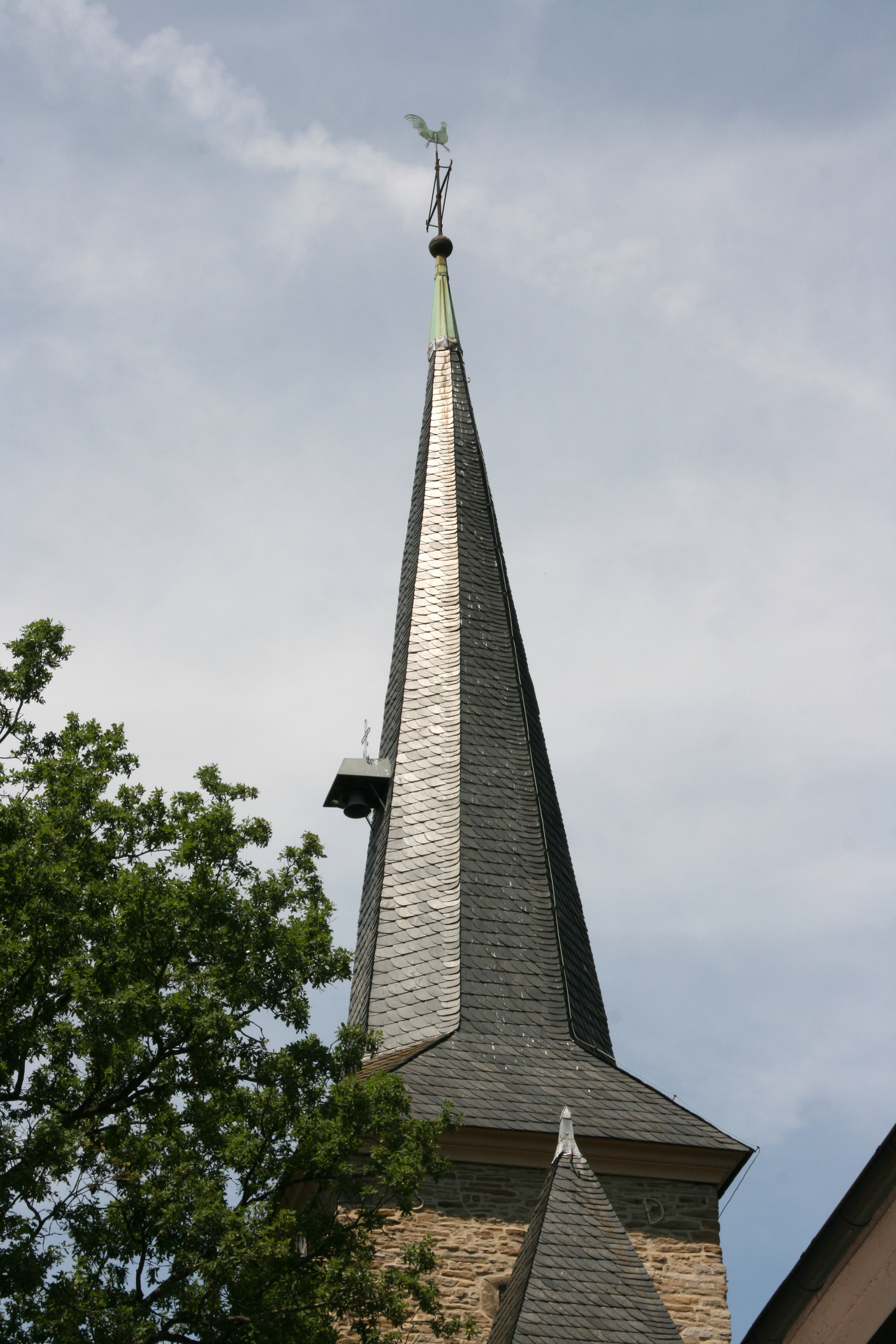 Dorfkirche Wengern, Kirchstraße in Wetter (Ruhr)-Wengern